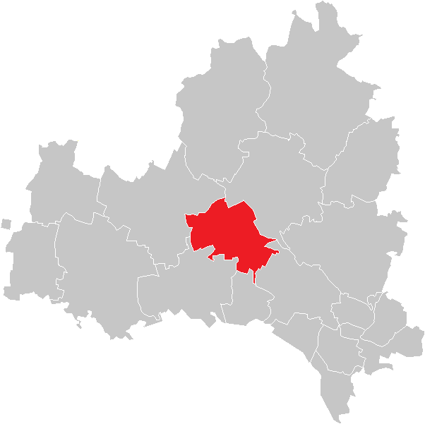 Bezirk Korneuburg